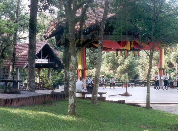 Biergarten en Nova Petrópolis